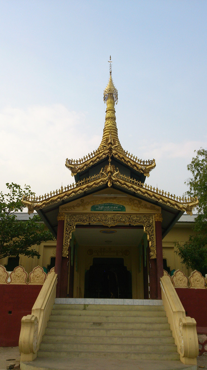 မြန်မာဘာသာ: စစ်ကိုင်းမှ သူခိုးကြီး ငတက်ပြား လှူထားခဲ့သည်ဆိုသော် မရှိခဏ (မဟီယင်္ဂဏ) စေတီတော်